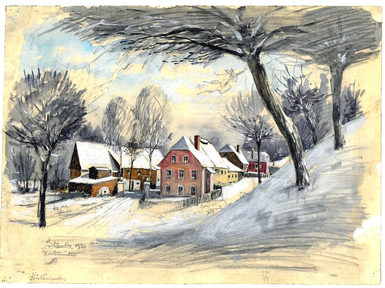 Hüttermühle Radeberg um 1930; rechts Mühlen- und Wohngebäude, links Ställe, Scheunen; nach rechts hinter dem Hang führt der Fahrweg nach Wallroda